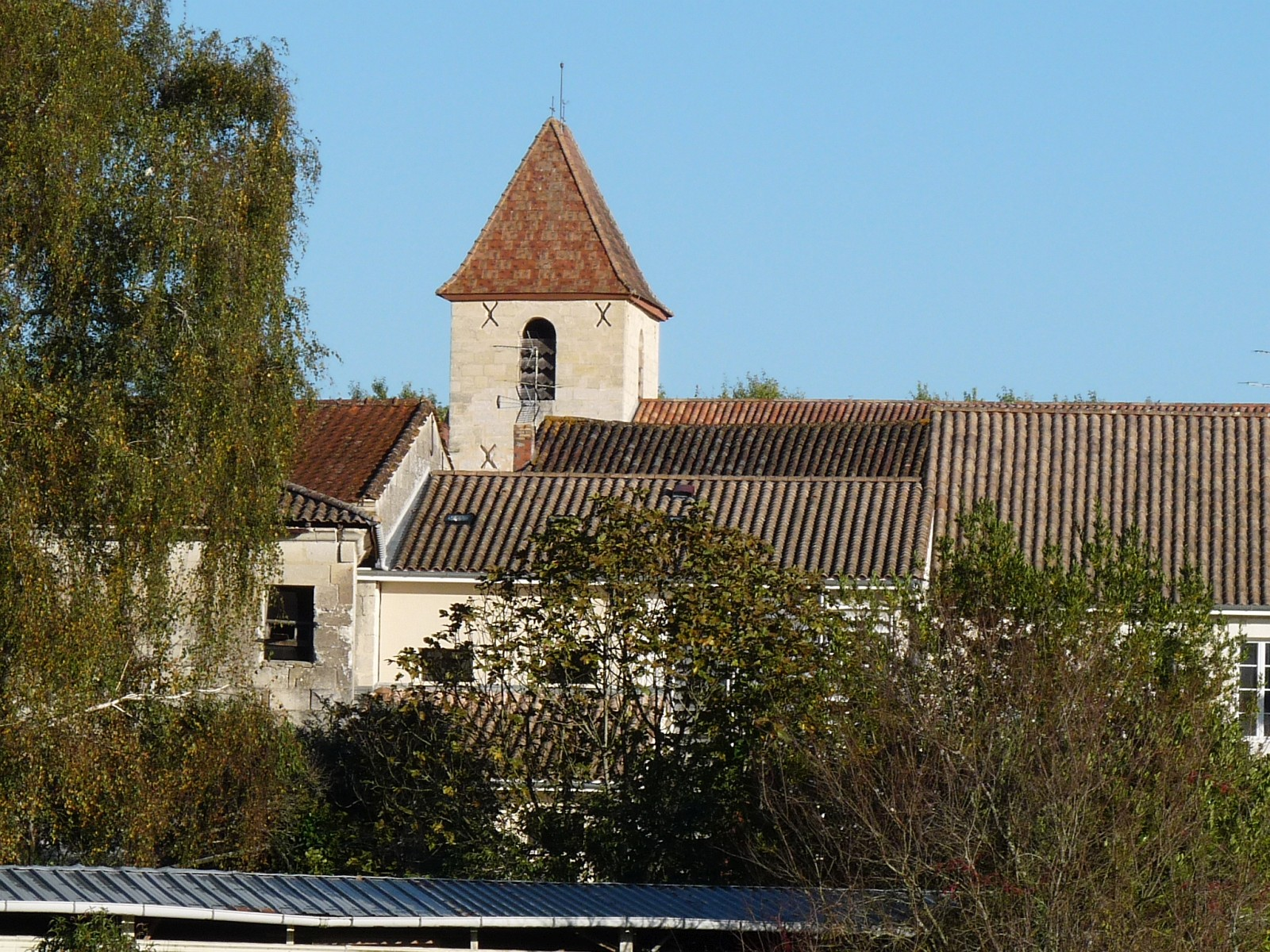 Eglise de Cercoux, Charente-Maritime, France